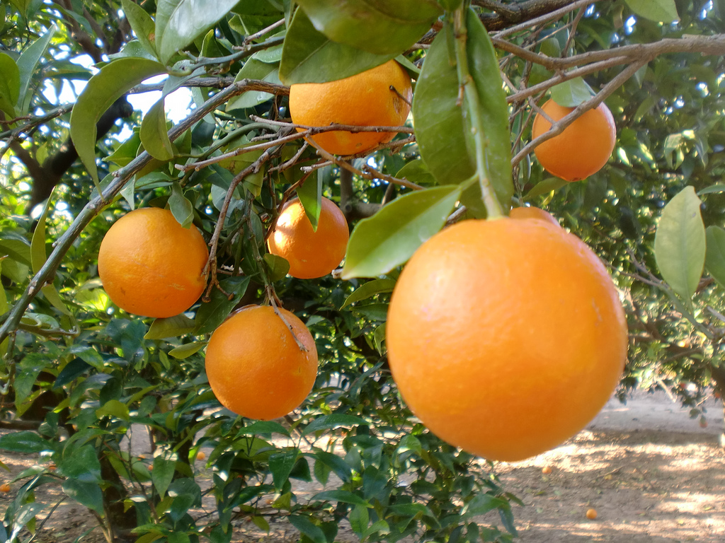 Naranjas en el árbol, en Valencia.